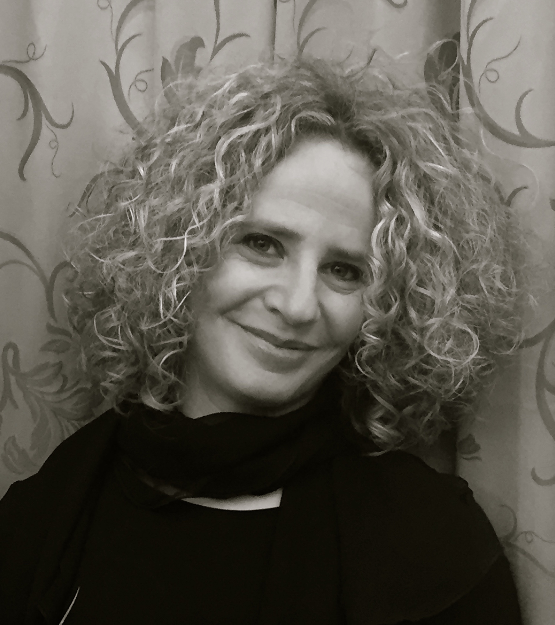 Verő Bán Linda rebecen, író, oktató